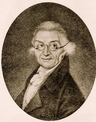 Gravure du portrait de Johann Wilhelm Hässler, compositeur (1747–1822)